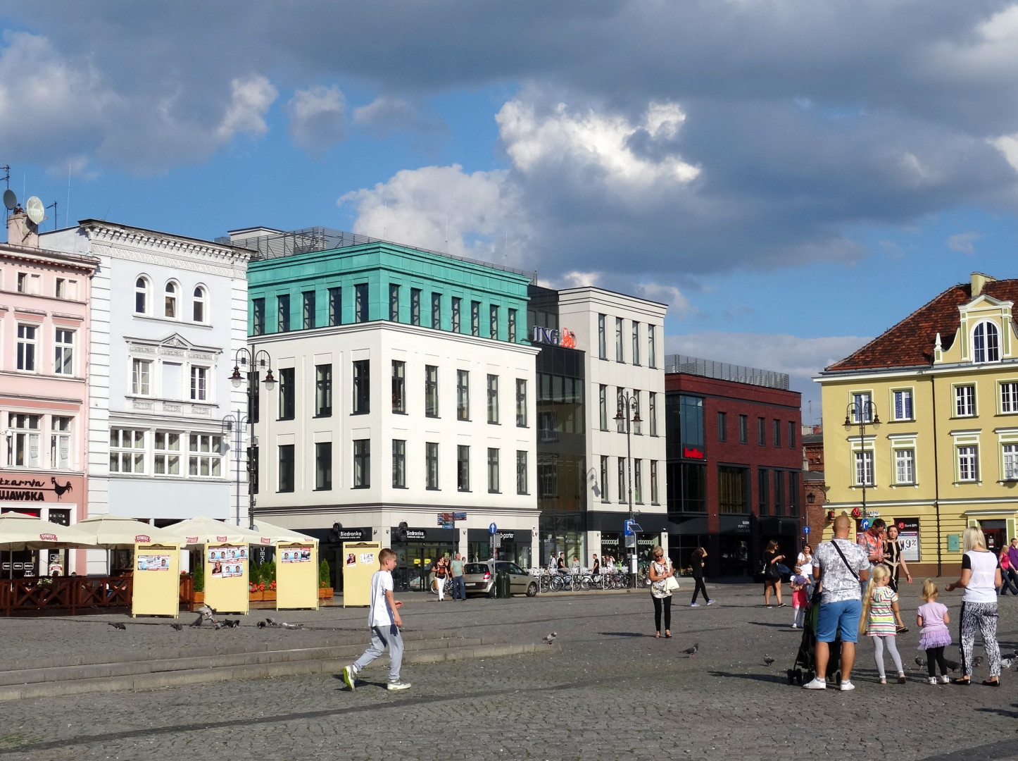 Stary Rynek w Bydgoszczy